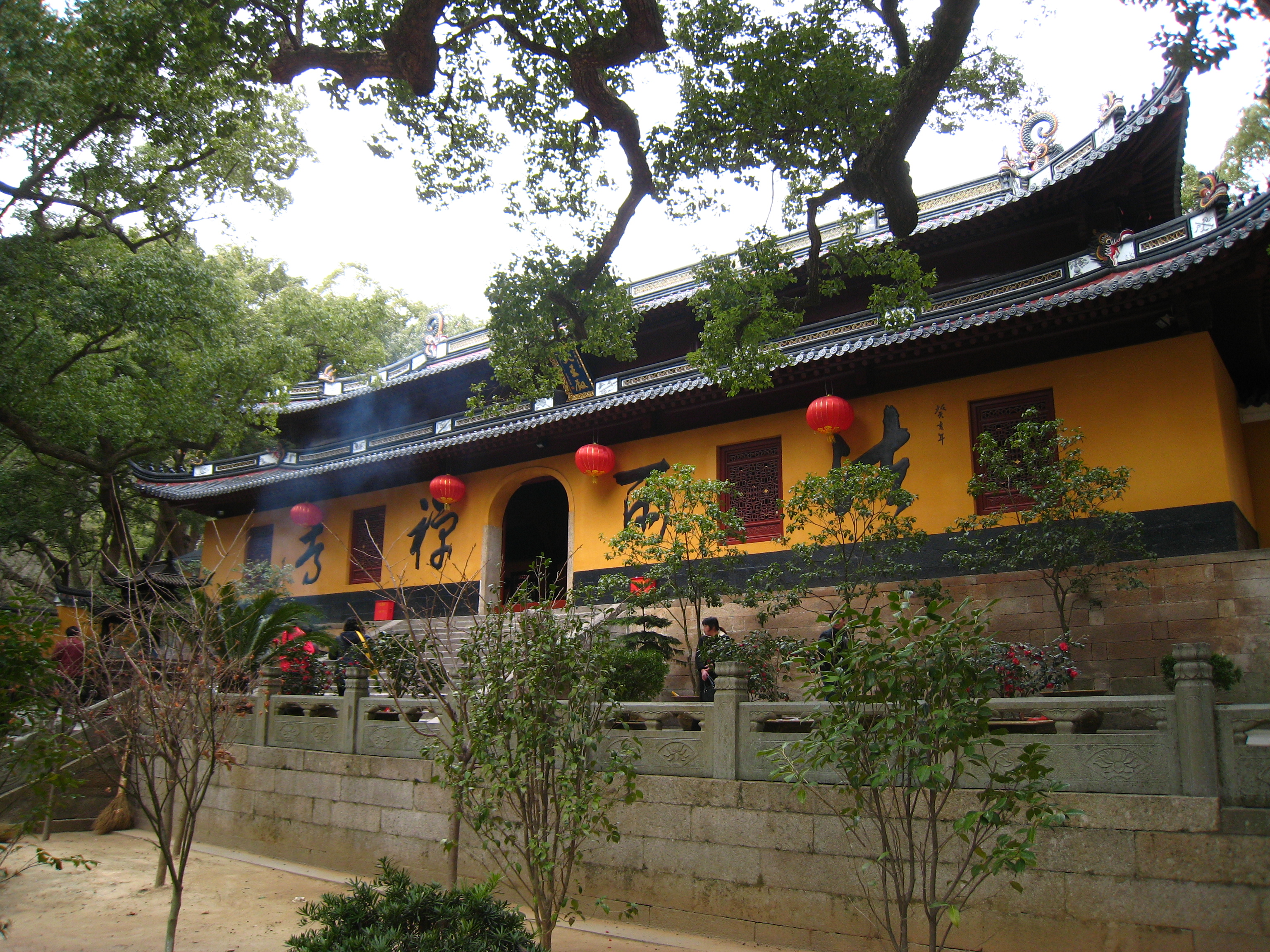 法雨禅寺